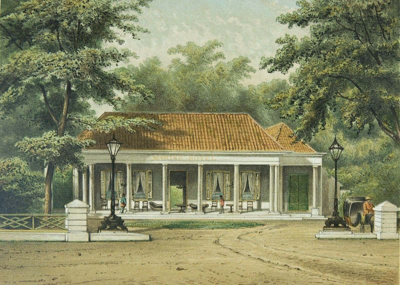 Litho. Litho naar een oorspronkelijke aquarel van J. Rappard.. Het Marine hotel in Batavia